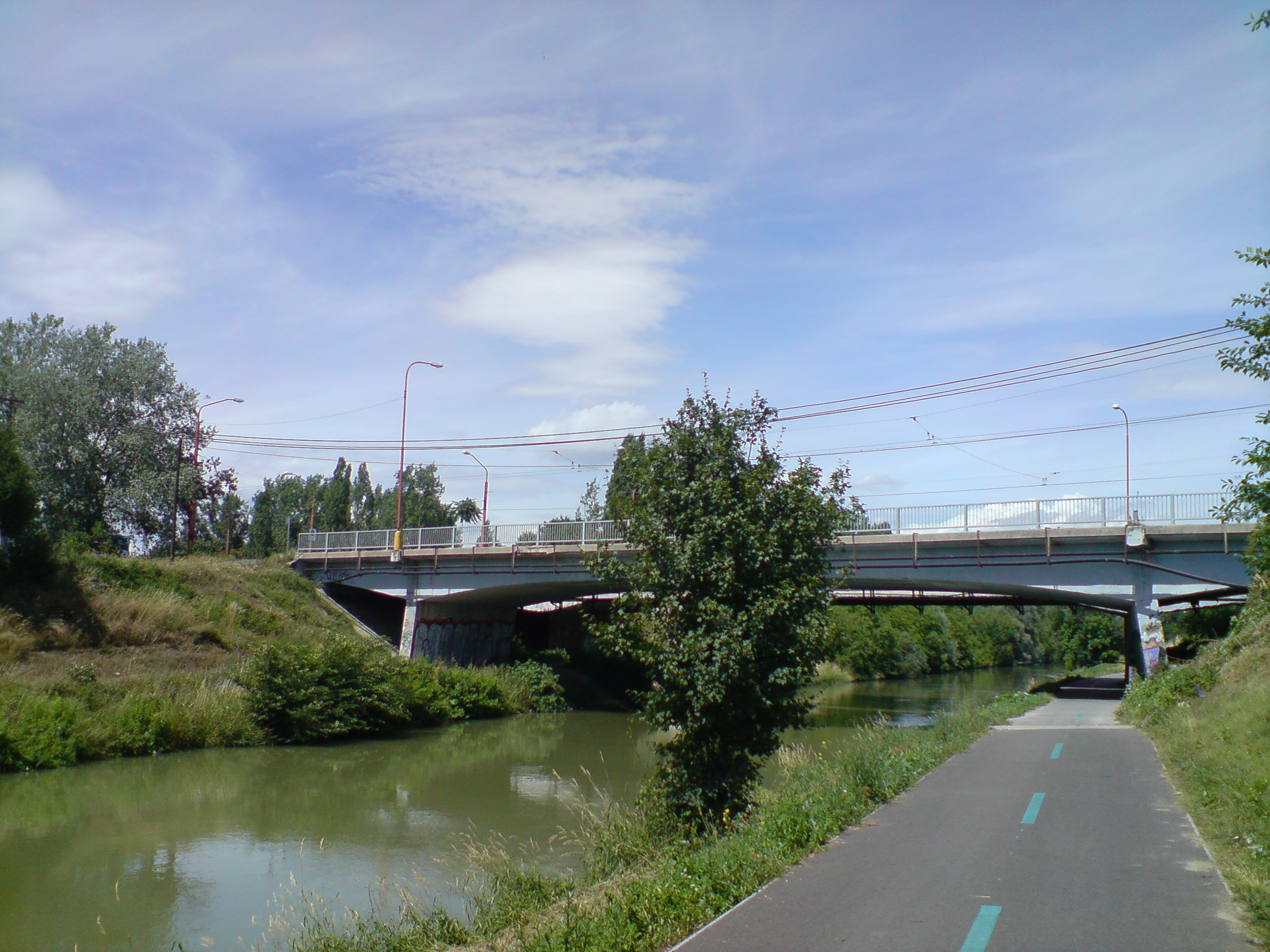 Malý Dunaj